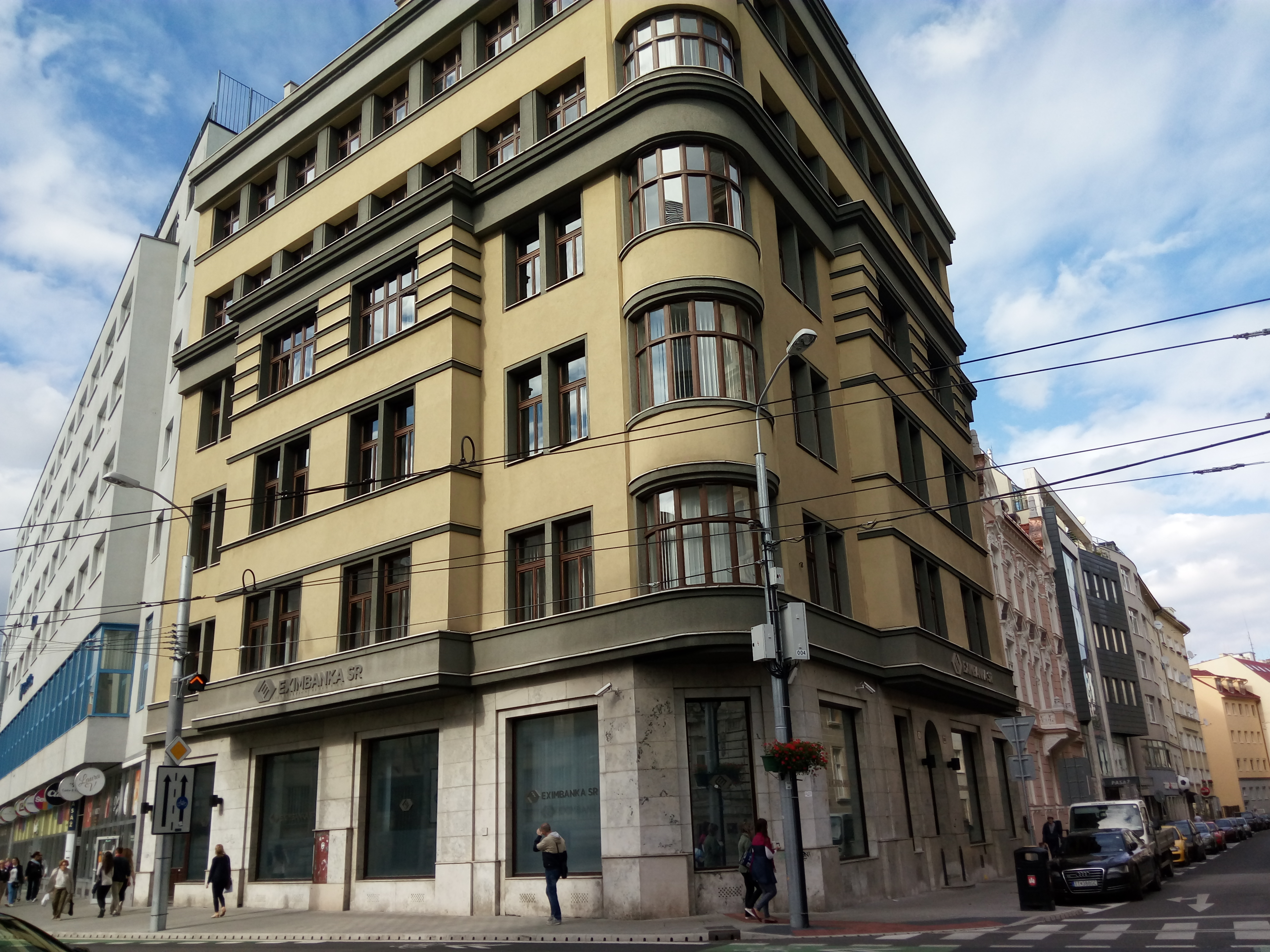 Štúrova, Staré Mesto, Bratislava